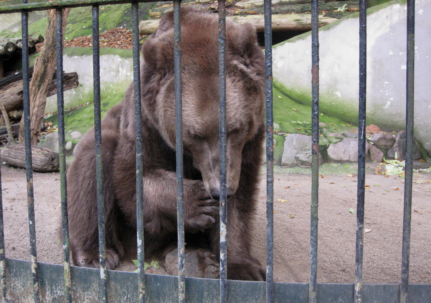 Braunbär Bruno, ehemaliger Manegenbär, im Tierpark Lübeck am vorletzten Öffnungstag